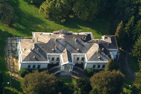 Kende kúria, Cégénydányád, Hungary, aerial photography